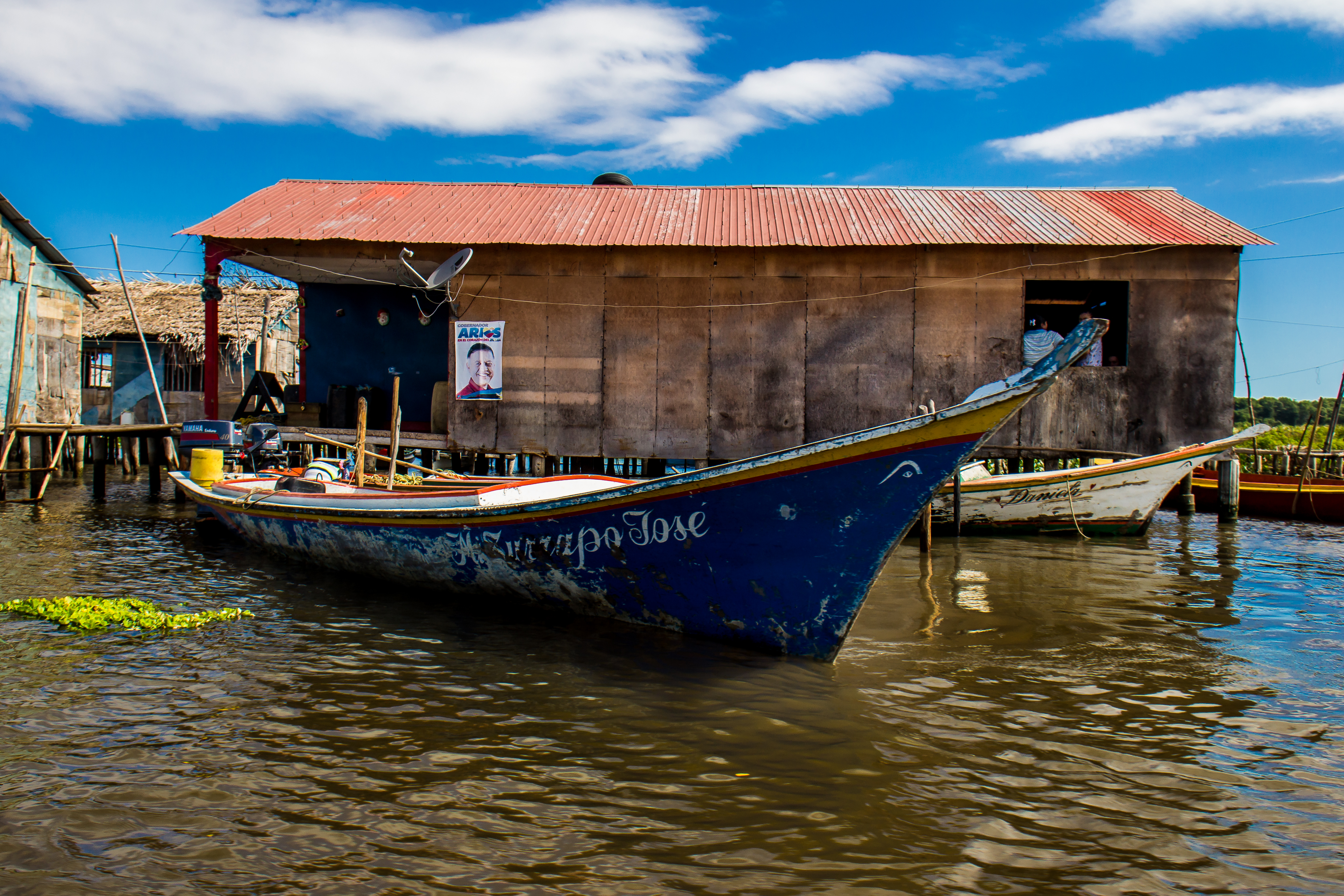 El sistema de transporte entre los pobladores de la Laguna de Sinamaica son estas pequeñas embarcaciones conocidas como curiaras donde la mayoria de los pobladores se desplazan dentro de la comunidad.